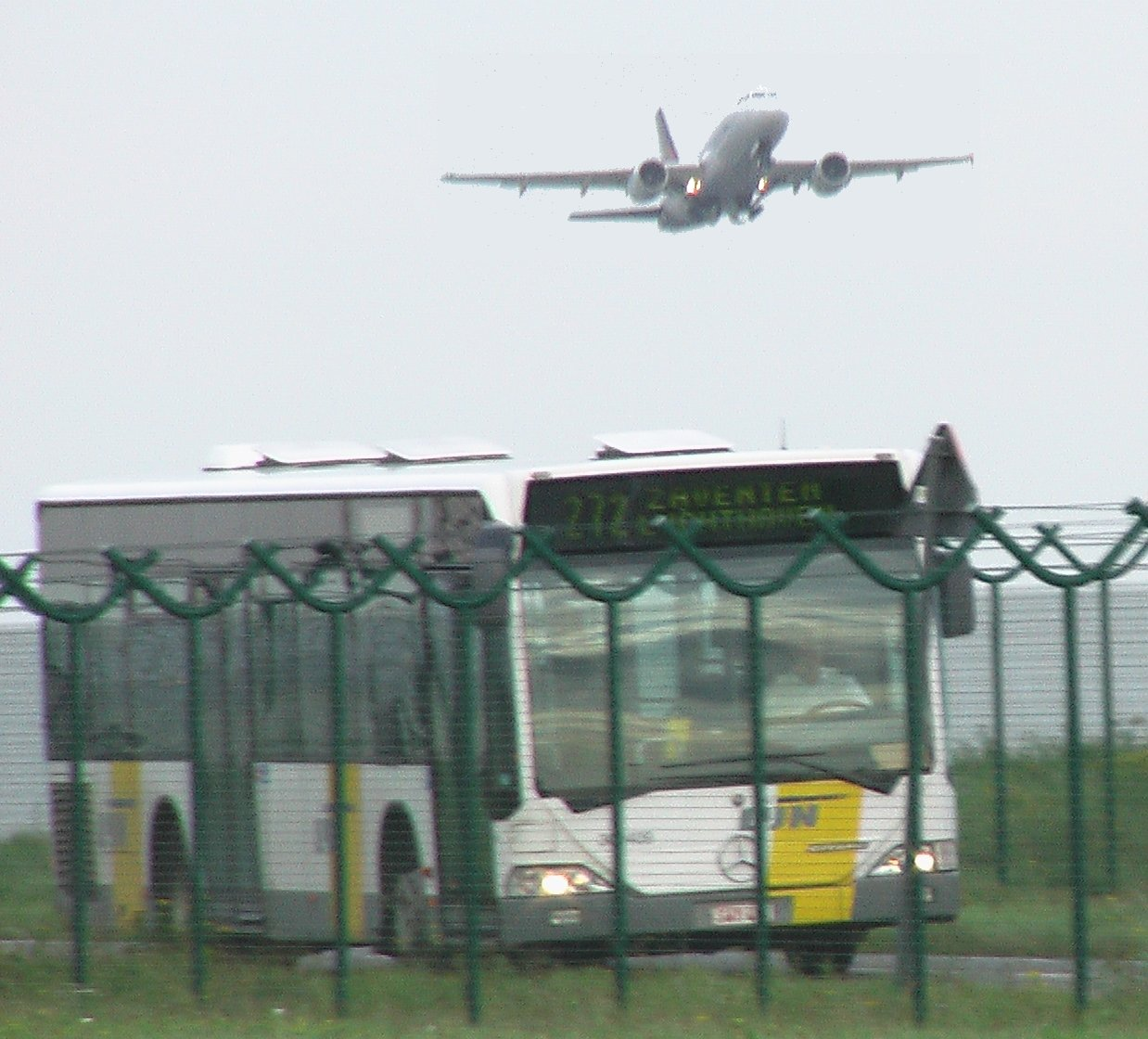 Bus van De lijn op lijn 272 (één van de START-lijnen), rijdend op een afgesloten traject net langs startbaan 25R van Brucargo naar Brussels Airport. Foto van bus genomen in de Eugéne Blaironstraat, grondgebied gemeente Machelen, België